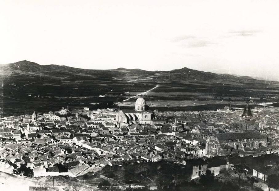 Vista desde el Paso de la Bandera, en la subida del cerro del Castillo. De derecha a izquierda se ven la iglesia del Niño, la Basílica, la torre del Reloj, la iglesia Vieja y el Hospitalico. Al fondo se ven la iglesia de San Francisco y su colegio.